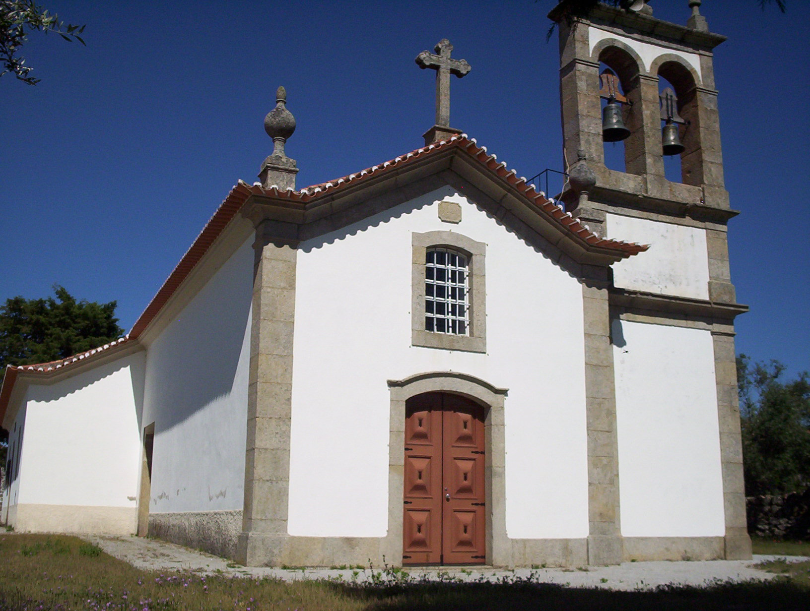 Igreja Matriz de Cerejo, Pinhel